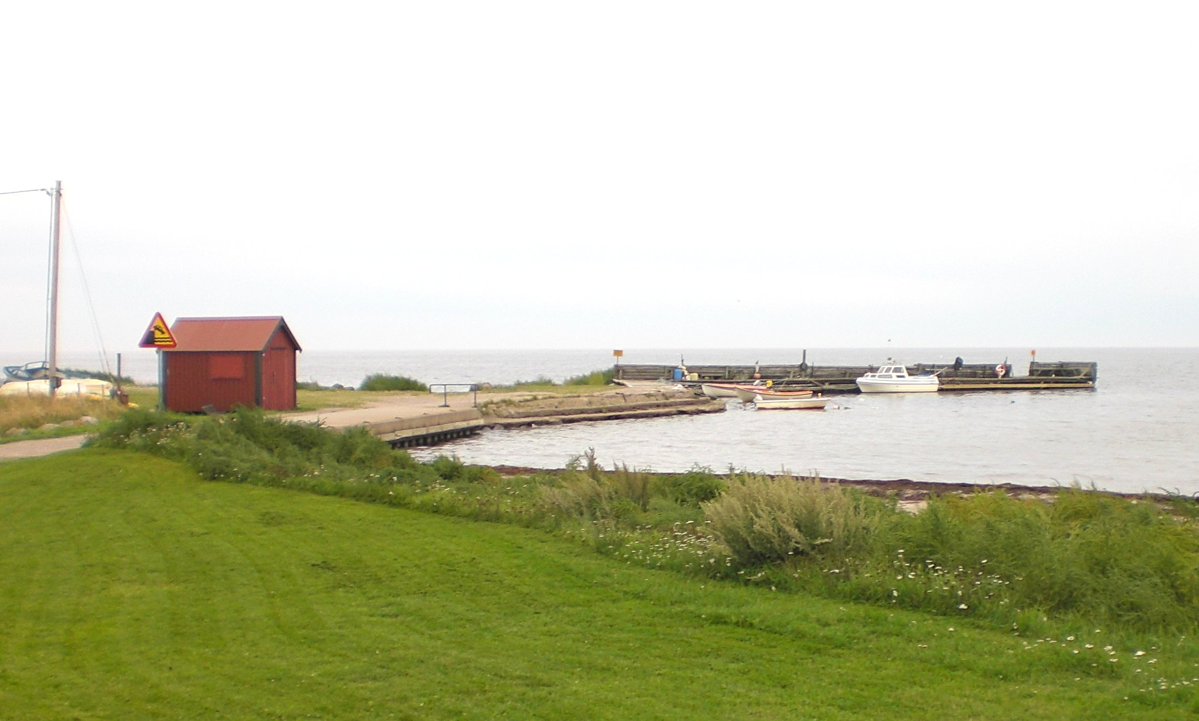 Hafen Kapelludden auf Öland, Schweden